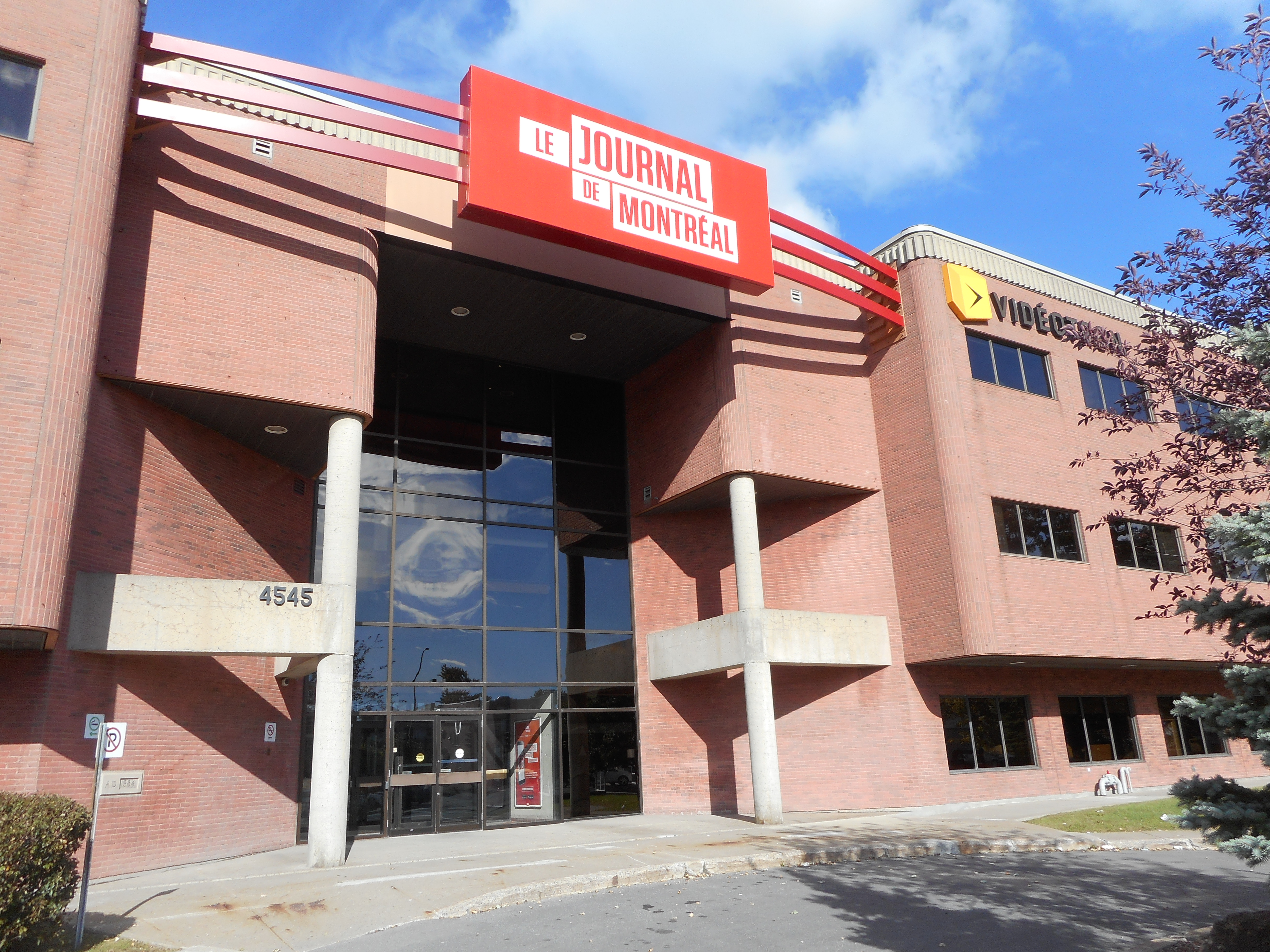 Édifice du Journal de Montréal, 4545, rue Frontenac, Montréal